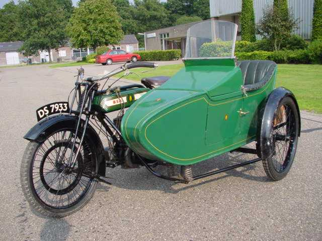 Toestemming van Yesterdays Antique Motorcycles ( Categorie:Afbeelding motorfiets